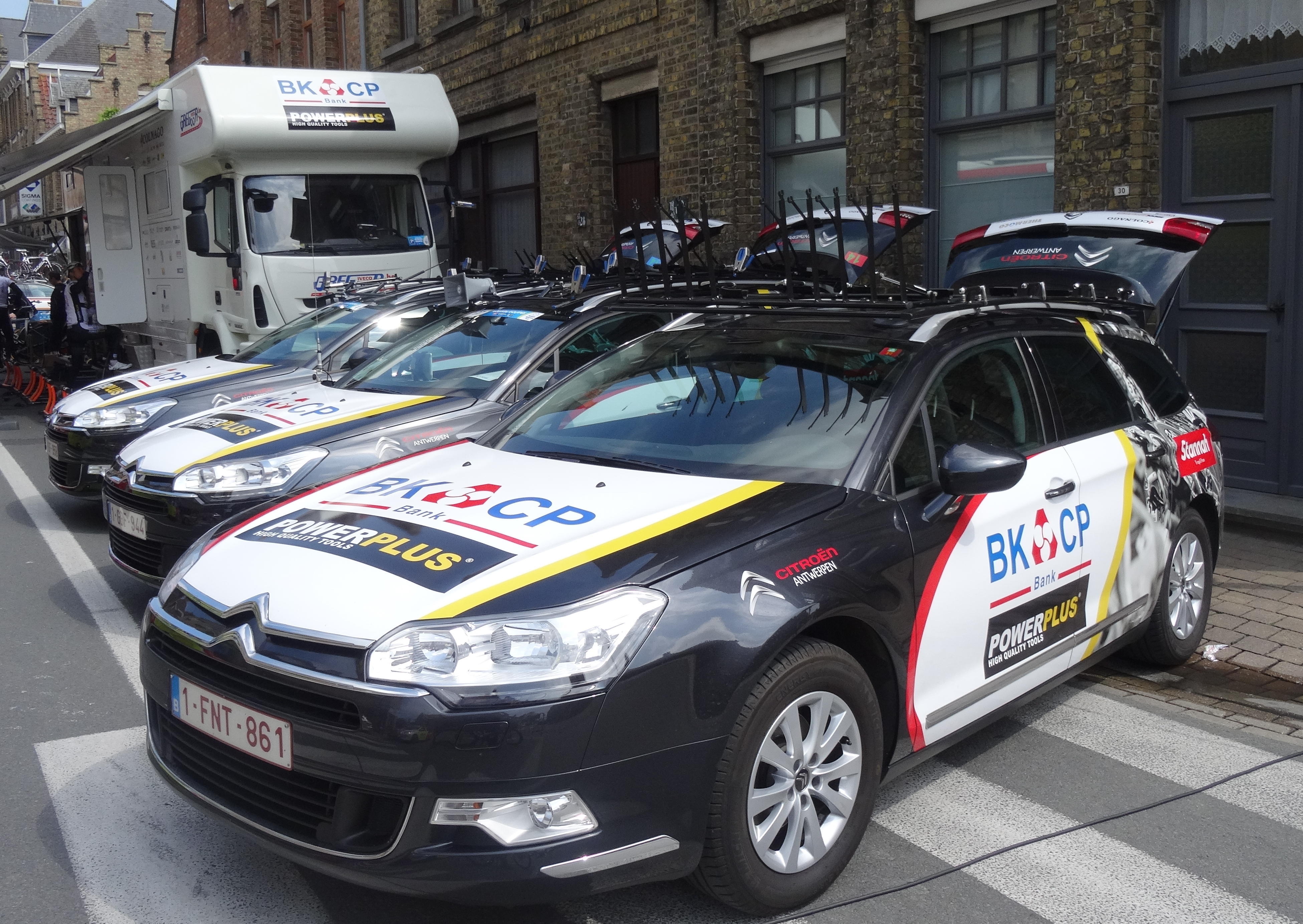 Reportage photographique réalisé le vendredi 30 mai à l'occasion du contre-la-montre individuel de la troisième étape du Tour de Belgique 2014 à Dixmude, Belgique.